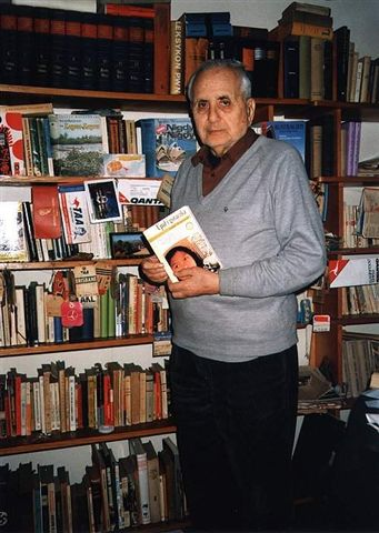 Lucjan Wolanowski (1920-2006), Polish writer